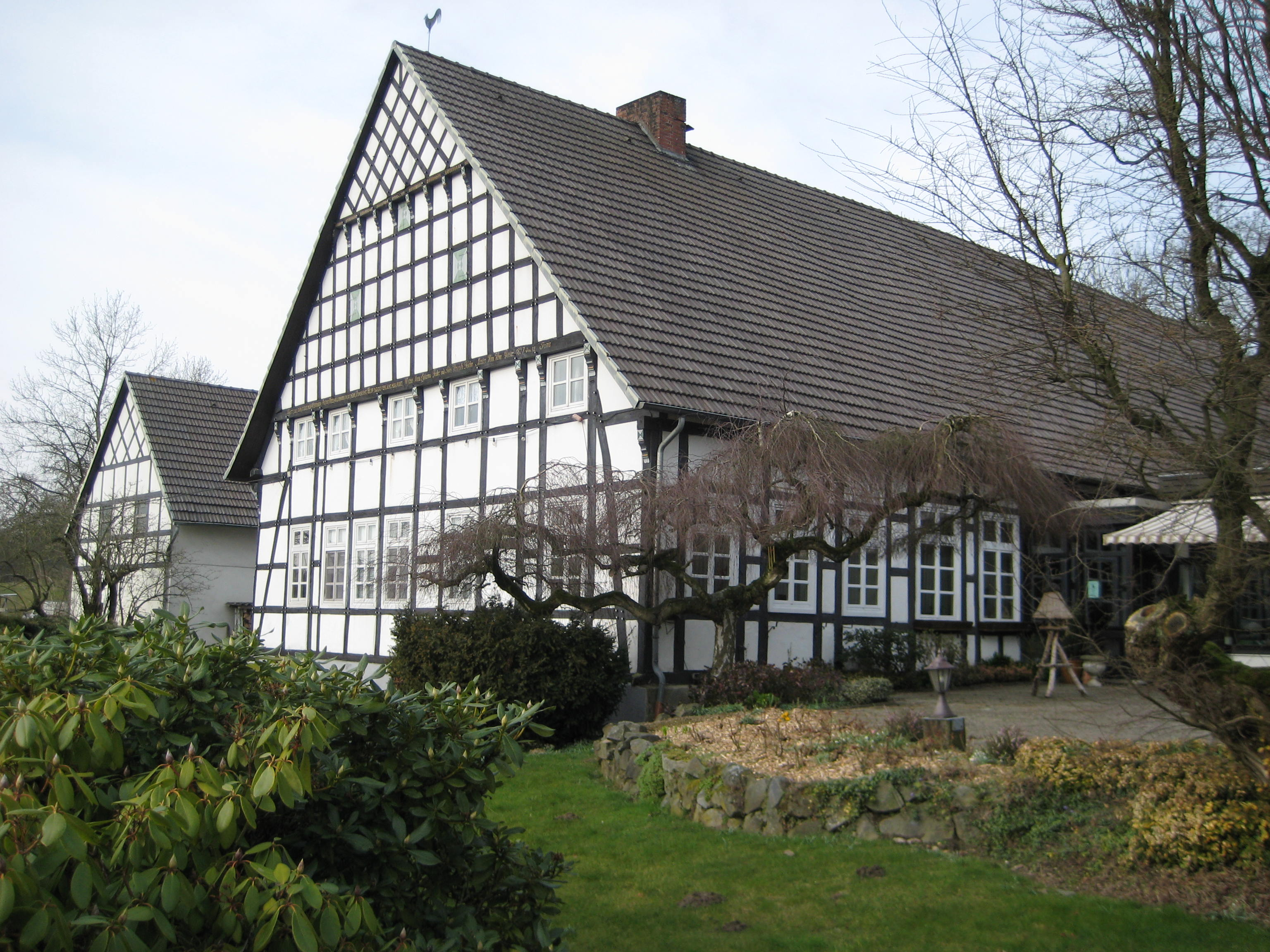 Jägerhof am Urberg in Bad Iburg, Fachwerkgebäude mit dem Gründungsdatum 12. Juni 1827 (Inschrift an der Giebelseite)